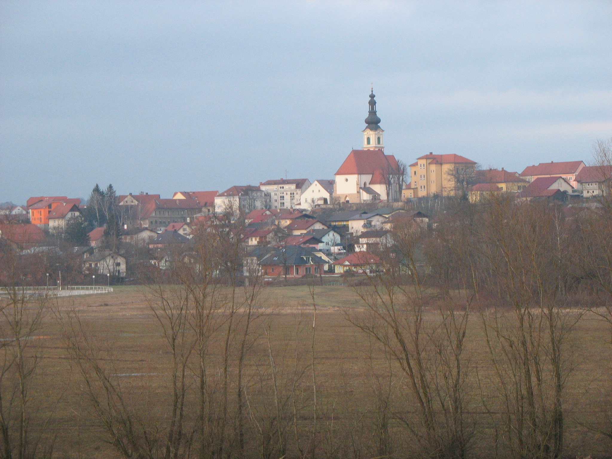 Pogled z juga na mesto Lenart